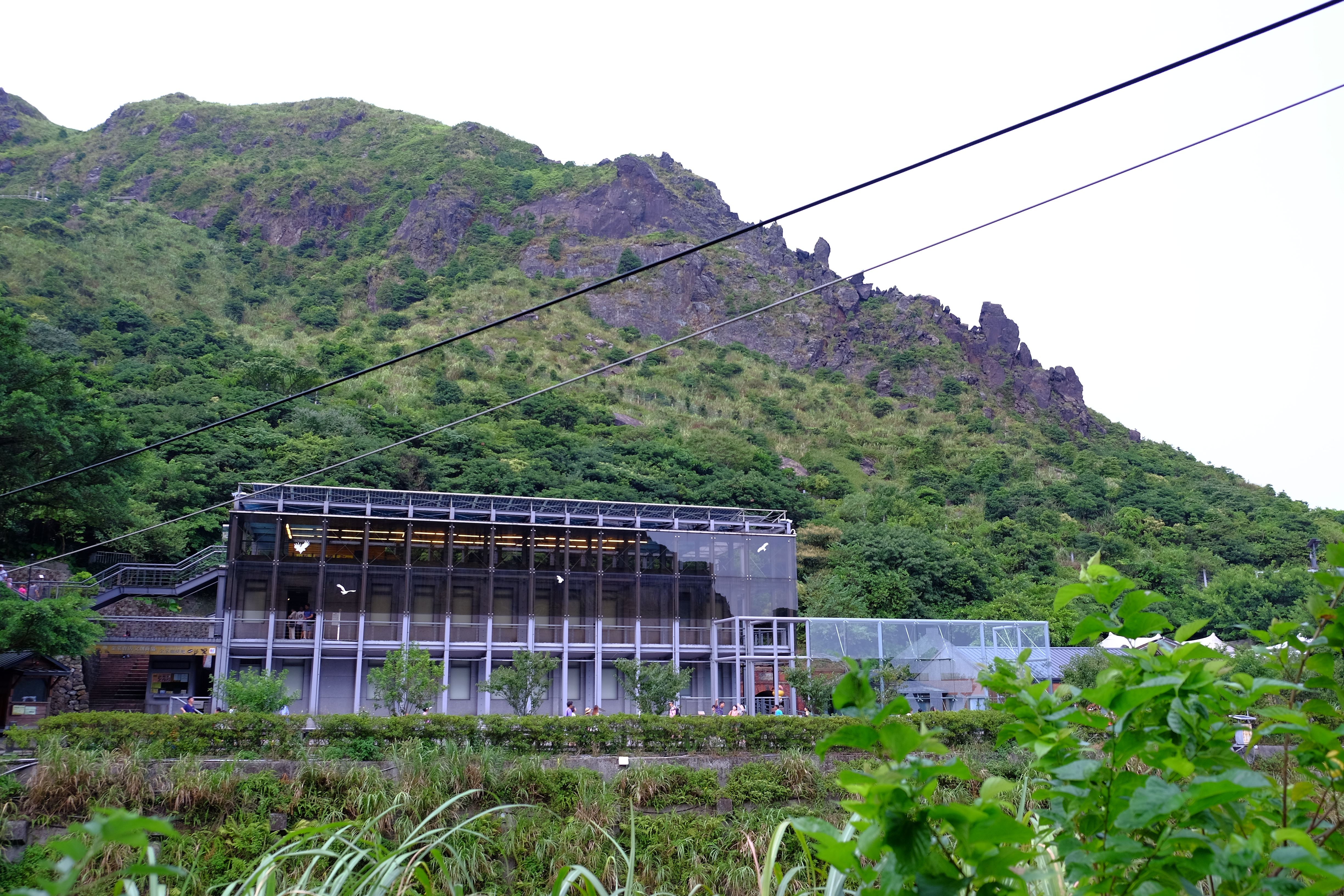 新北市立黃金博物館